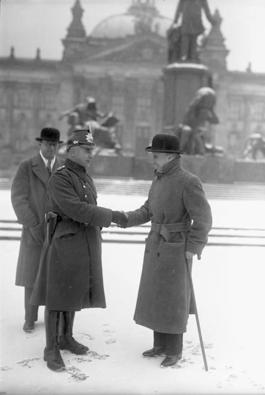 Charly Chaplin befreundet sich mit dem Berlin Schutzpolizisten! Freundliche Begrüssung Charly Chaplins vor dem Reichstag in Berlin.